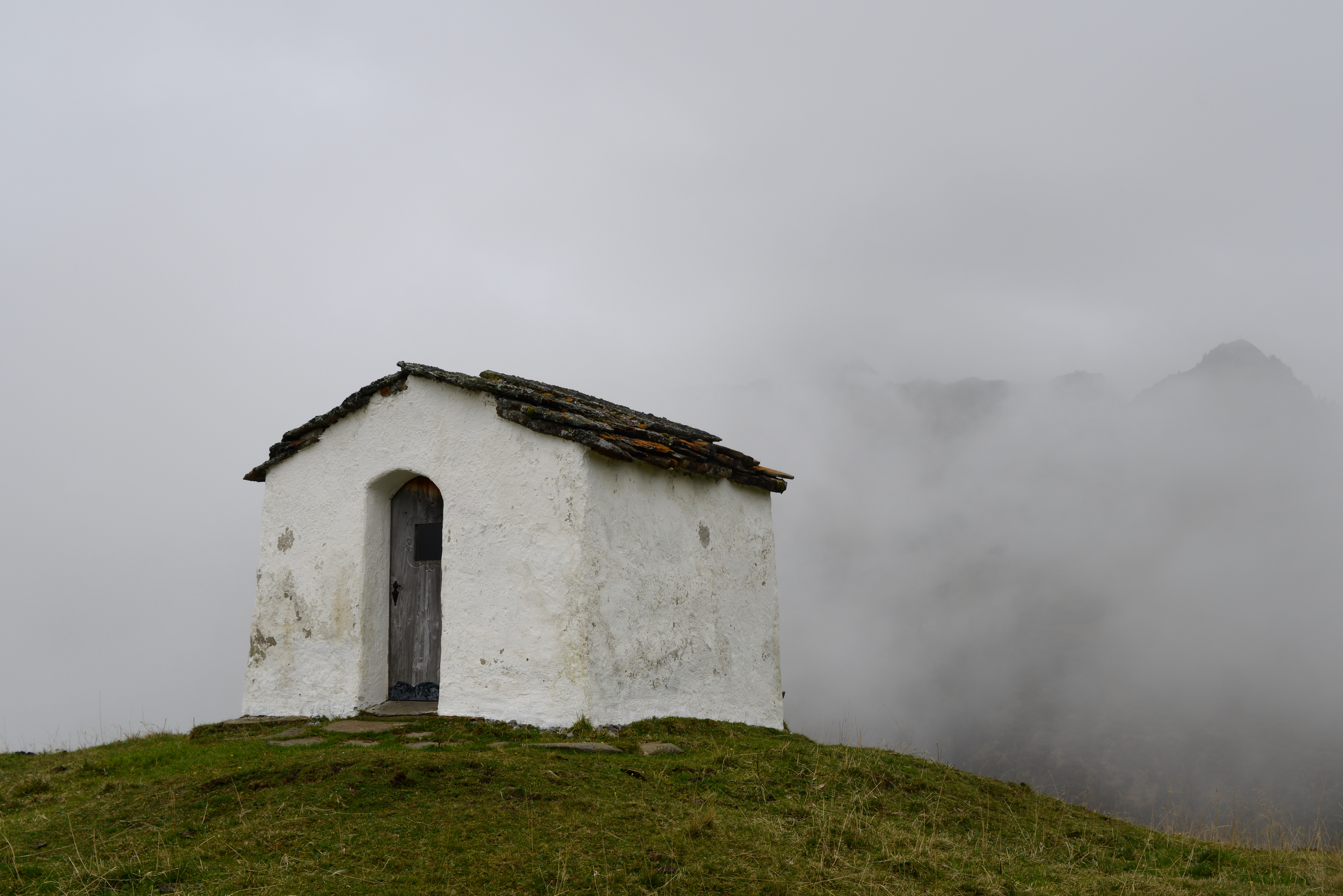 Kapelle Stofel bei der Alpe Oberdamüls; Info Das Objekt steht unter Denkmalschutz.